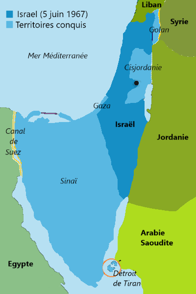 Carte d'Israël et des territoires conquis lors de la Guerre des 6 jours.